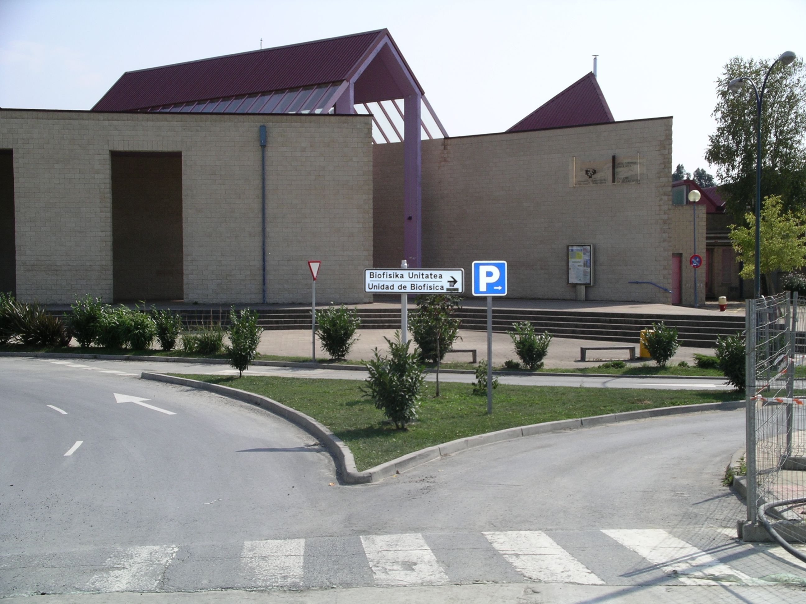 Euskal Herriko Unibertsitateko Arte Ederretako Fakultatea, Bizkaiko Campusa, Leioa-Erandio, Euskal Herriko Unibertsitatea.